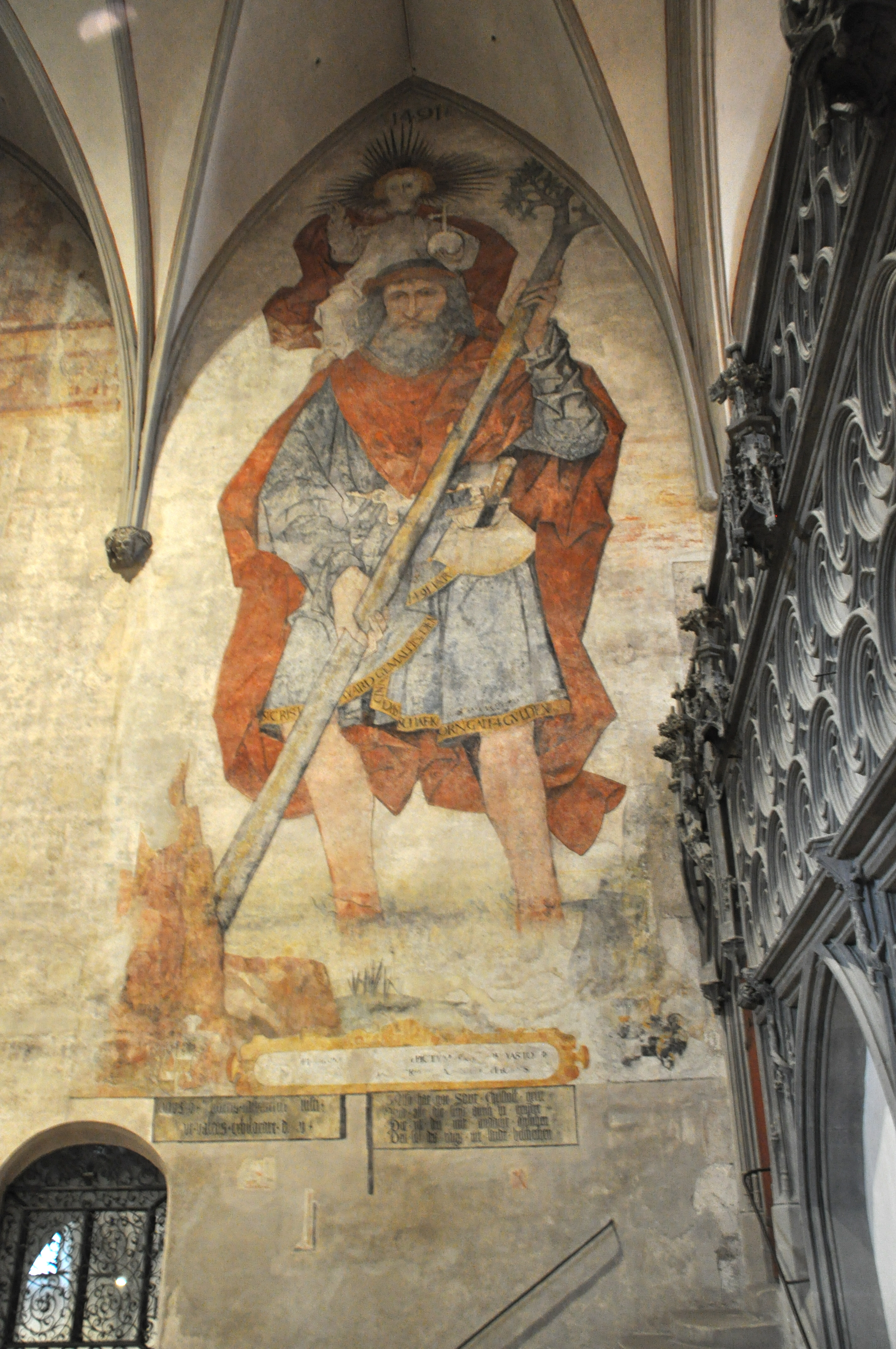 Augsburg, Dom, Fresko des hl. Christophorus von Ulrich Apt dem Älteren, 1491